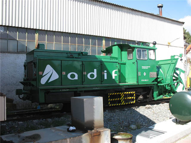 Locomotora diésel quitanieves 300.111.2 de Adif.